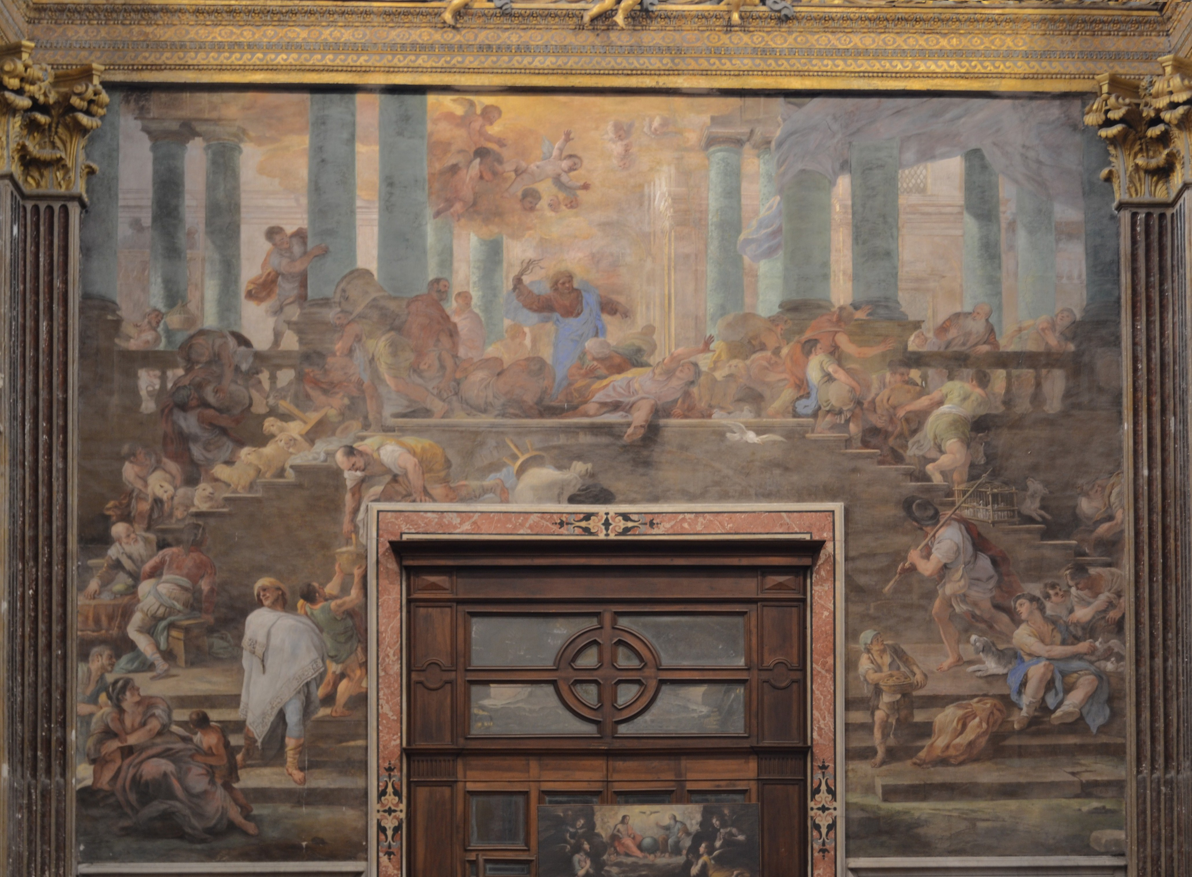 Chiesa dei Girolamini (Napoli) - Controfacciata; Cacciata dei Mercanti dal Tempio (Luca Giordano)